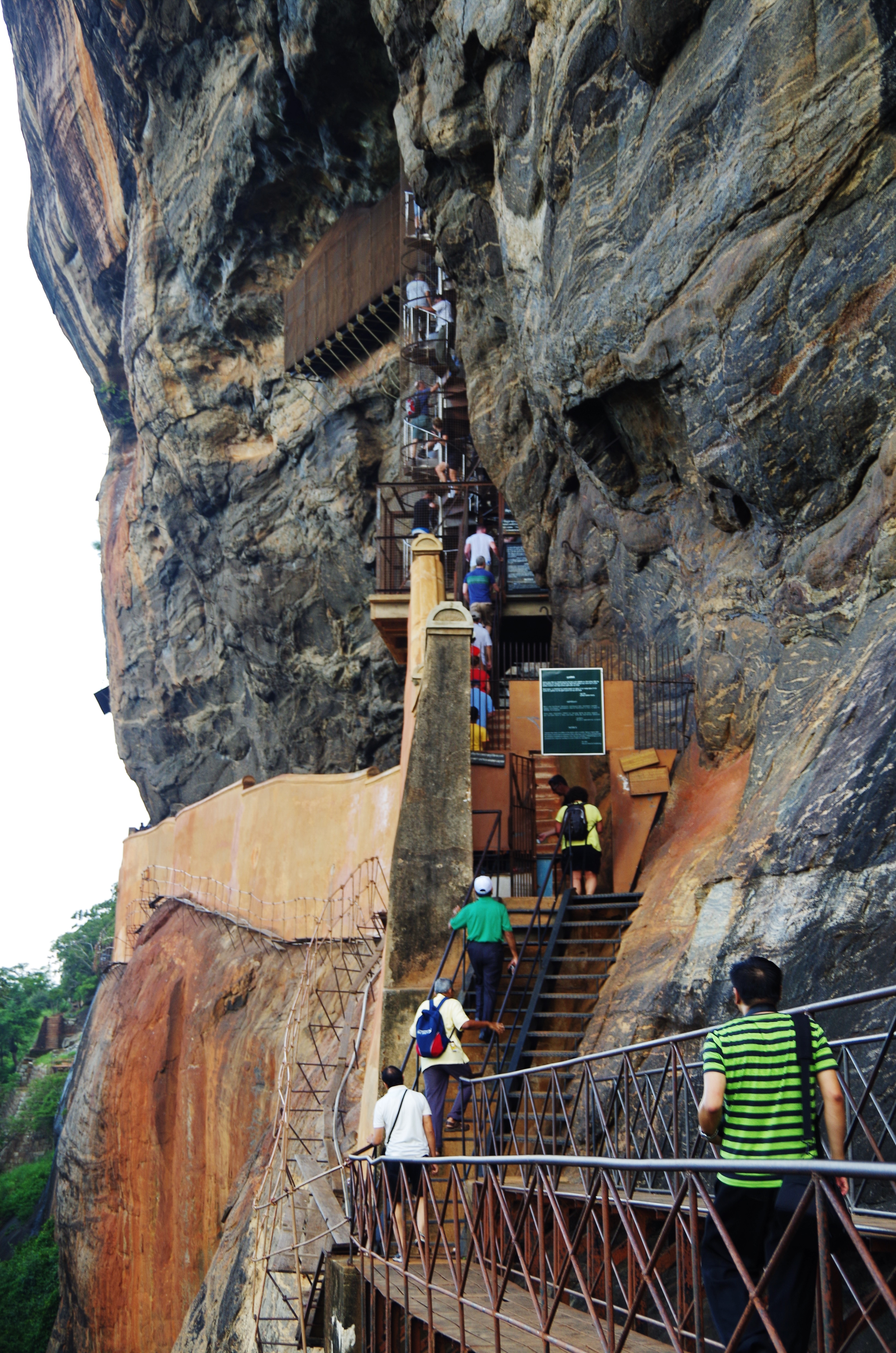 Aufstieg zu den Wolkenmädchen